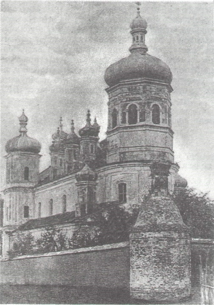 Беларуская (тарашкевіца): Юравічы (Juravičy). Касьцёл па перабудове пад царкву Маскоўскага патрыярхату